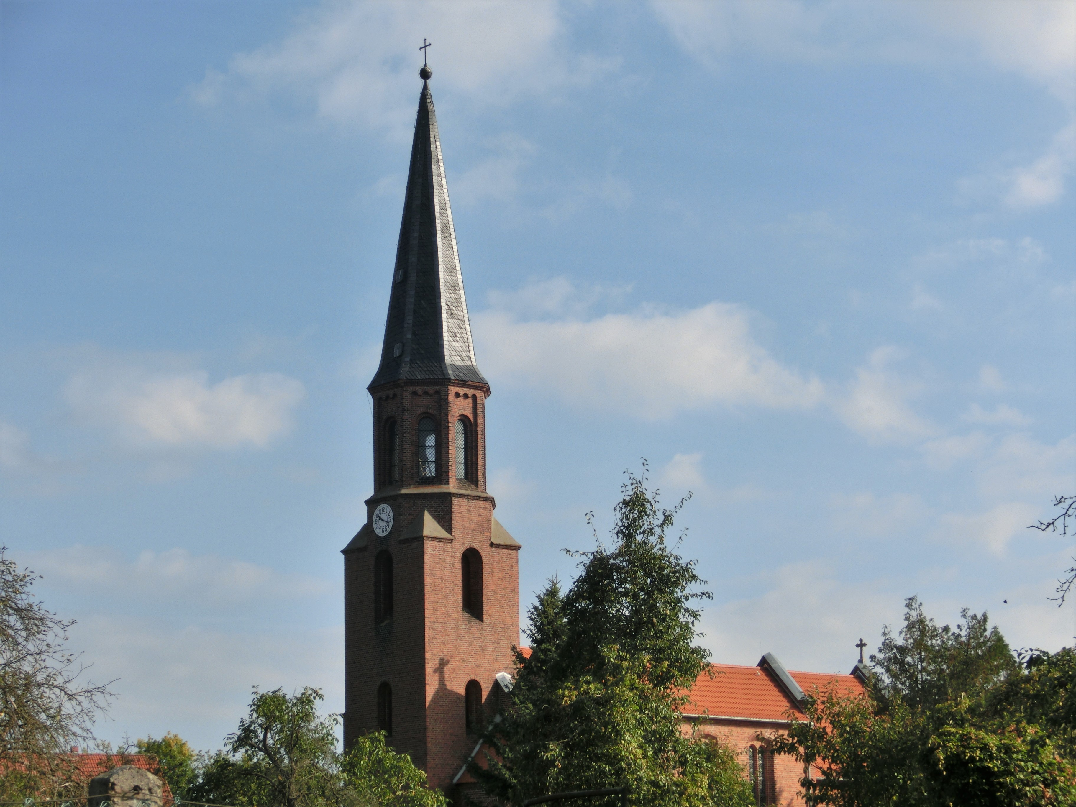 Baudenkmal, Erfassungsnummer 094 50278, Aufnahme aus Südwesten